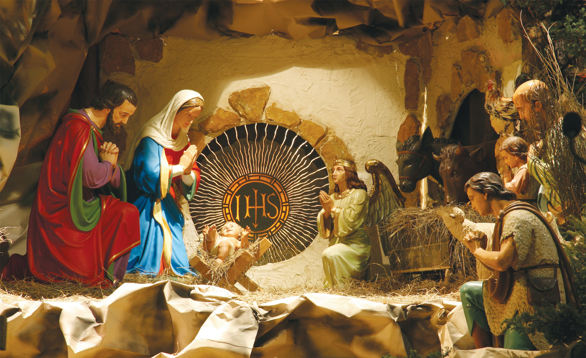 Crib in Katowice Panewniki, Poland (2009)